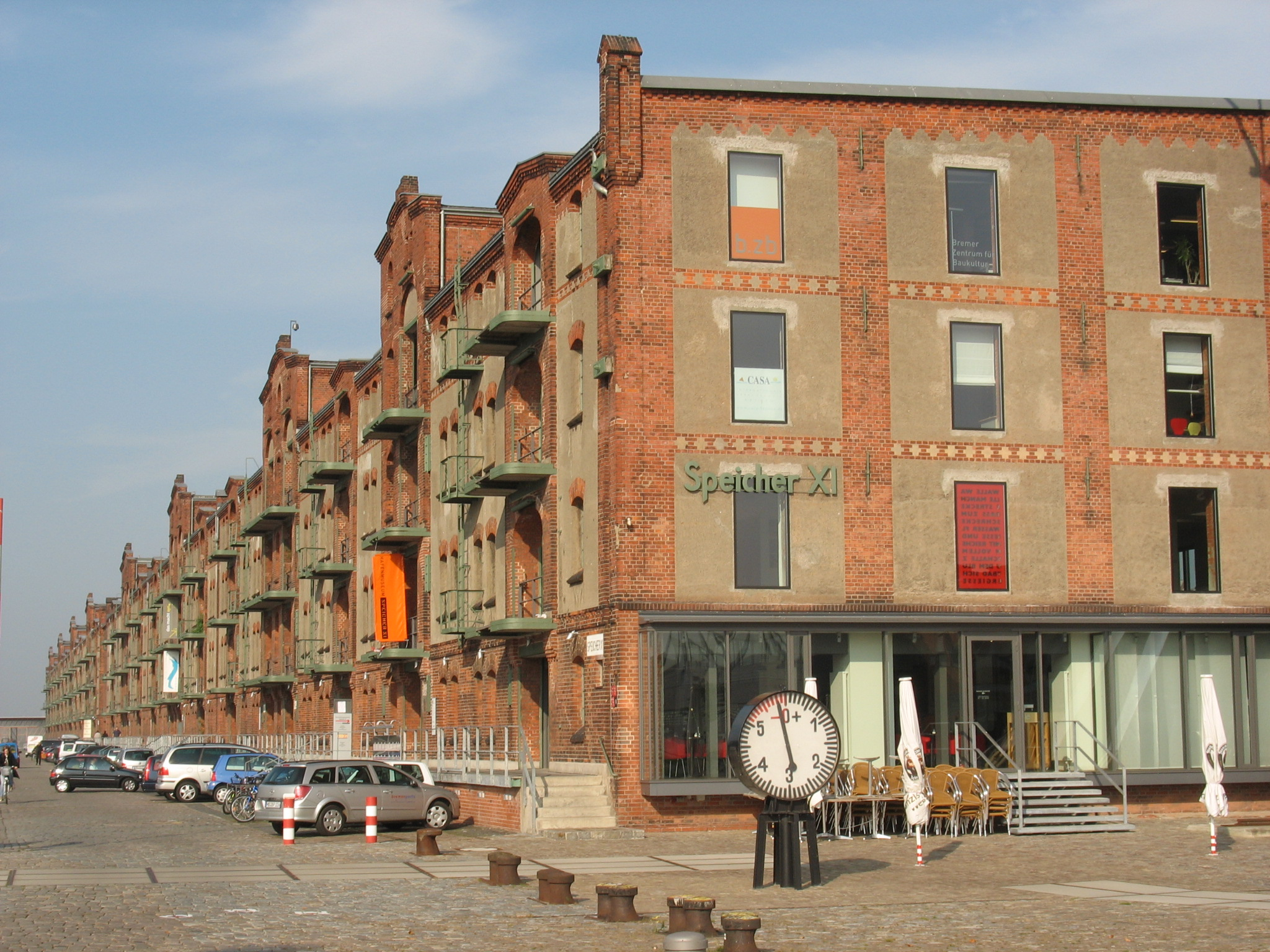 Bremen, Überseestadt, Speicher XI Das abgebildete Objekt ist ein geschütztes Kulturdenkmal in der Freien Hansestadt Bremen, mit der Nr. 0324 beim Landesamt für Denkmalpflege registriert.